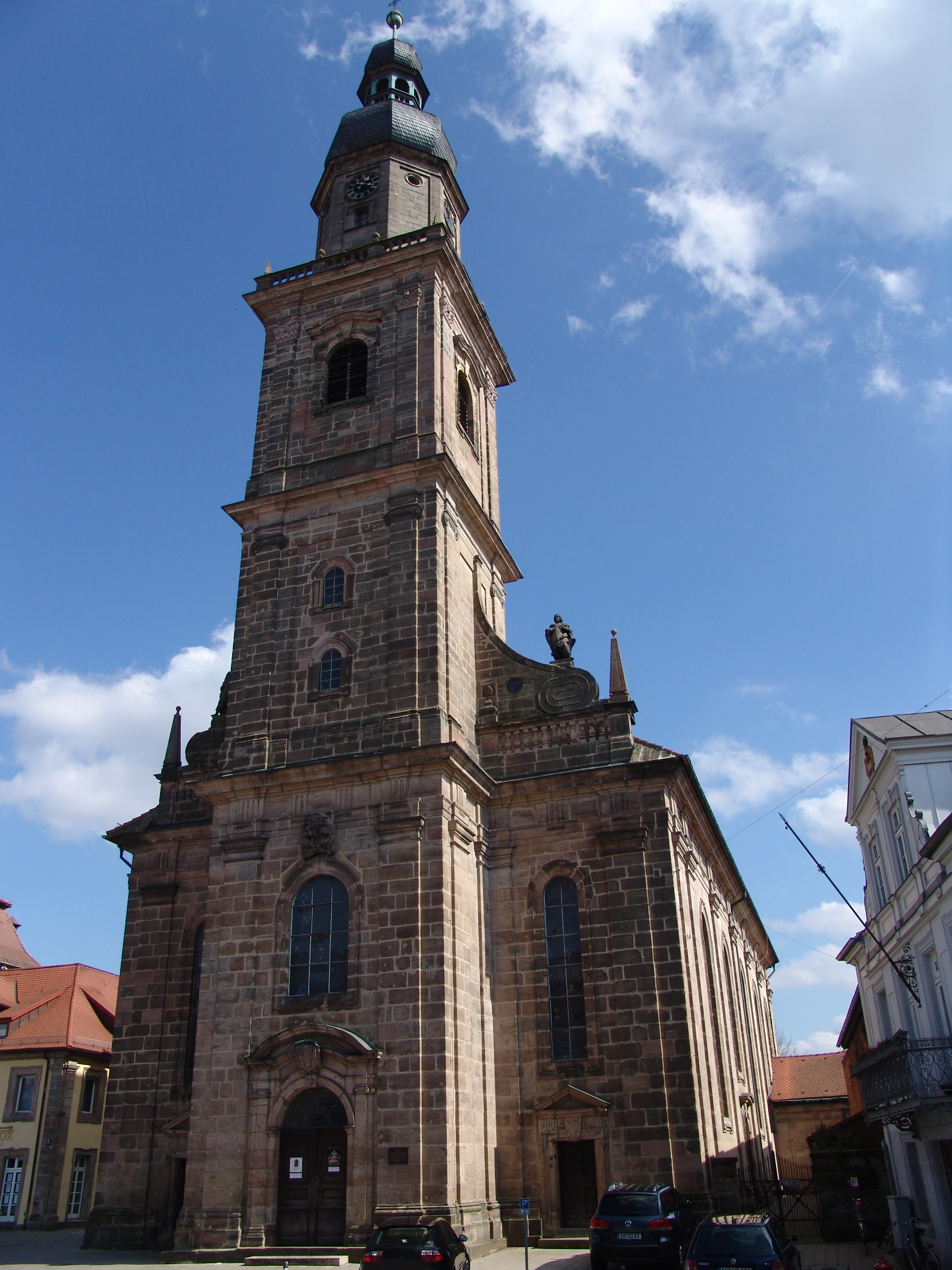 Altstädter Pfarrkirche in Erlangen